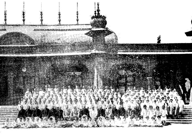 天津志略天津公学开办时的摄影，1927年拍摄于英国球场